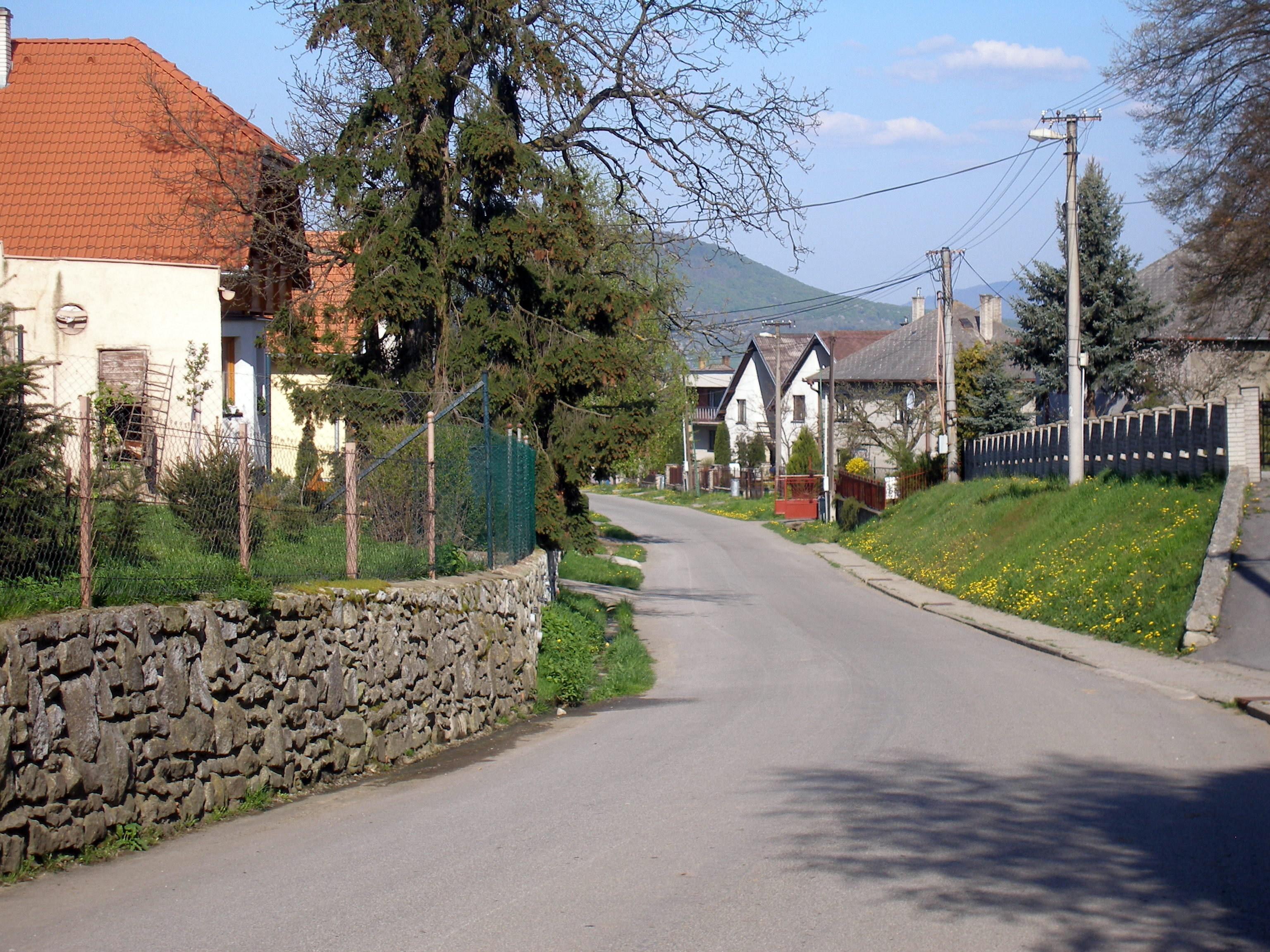 Obec Šarišská Poruba okres Prešov región Šariš